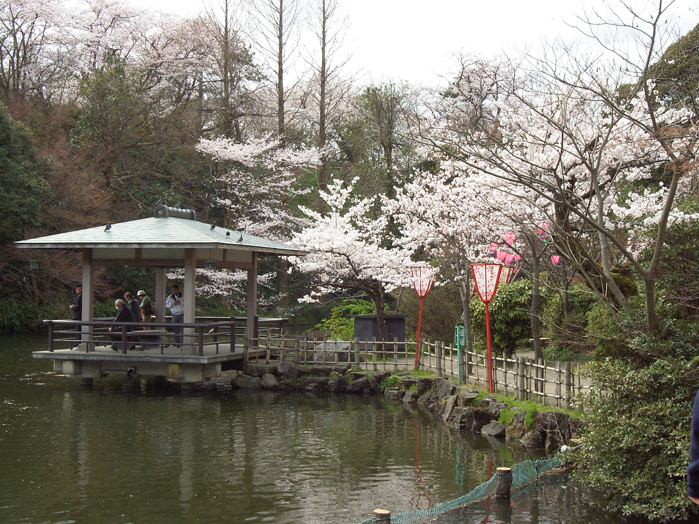 桜。高岡古城公園 (日本、富山県高岡市)にて。 / A cherry (Prunus sp.) in Takaoka Kojō Park (Takaoka-city, Toyama, Japan)